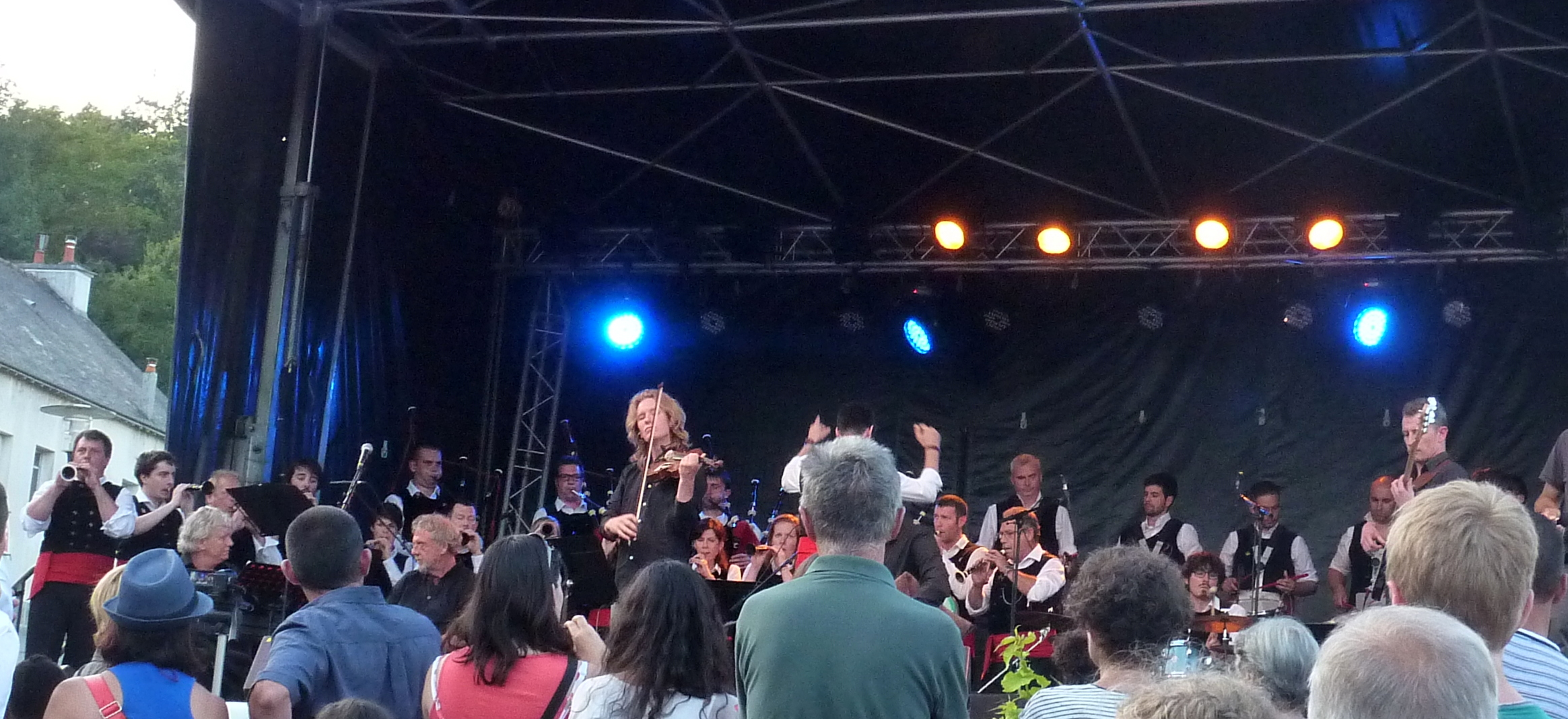 Quimperlé - Concert - L'AMOUR KERNÉ avec le BRAN PROJECT et le BAGAD DE QUIMPERLÉ